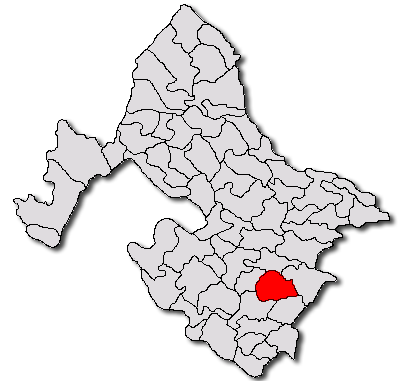 Categorie:Hărţi ale judeţului Mehedinţi